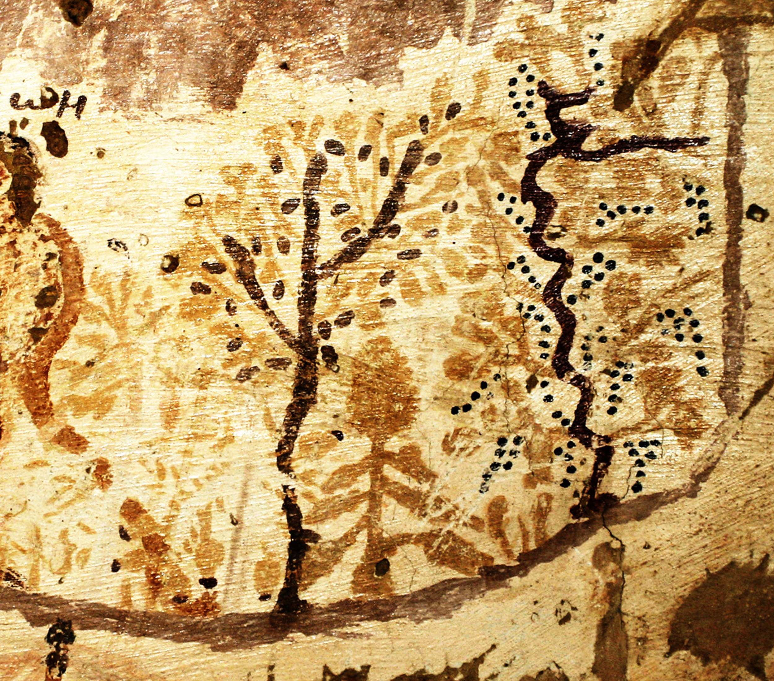 Palmeraie, fruitier et vigne dans l'oasis d'Al-Bagawat